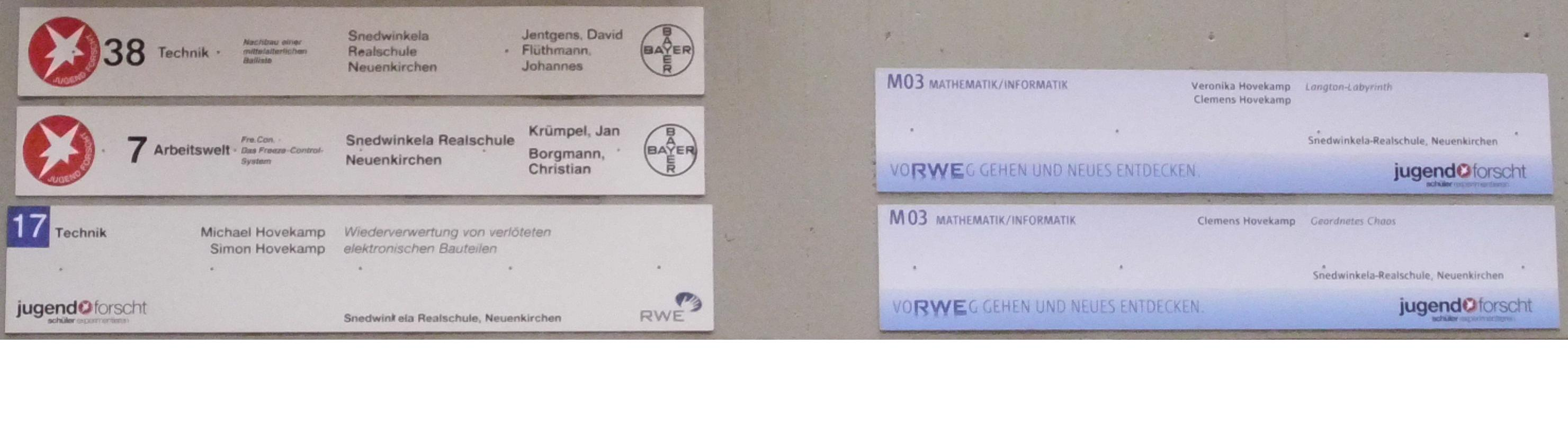 Standschilder der Arbeiten, die die Landeswettbewerbe bei Jugend forscht / Schüler experimentieren erreicht haben. (Stand 2015)